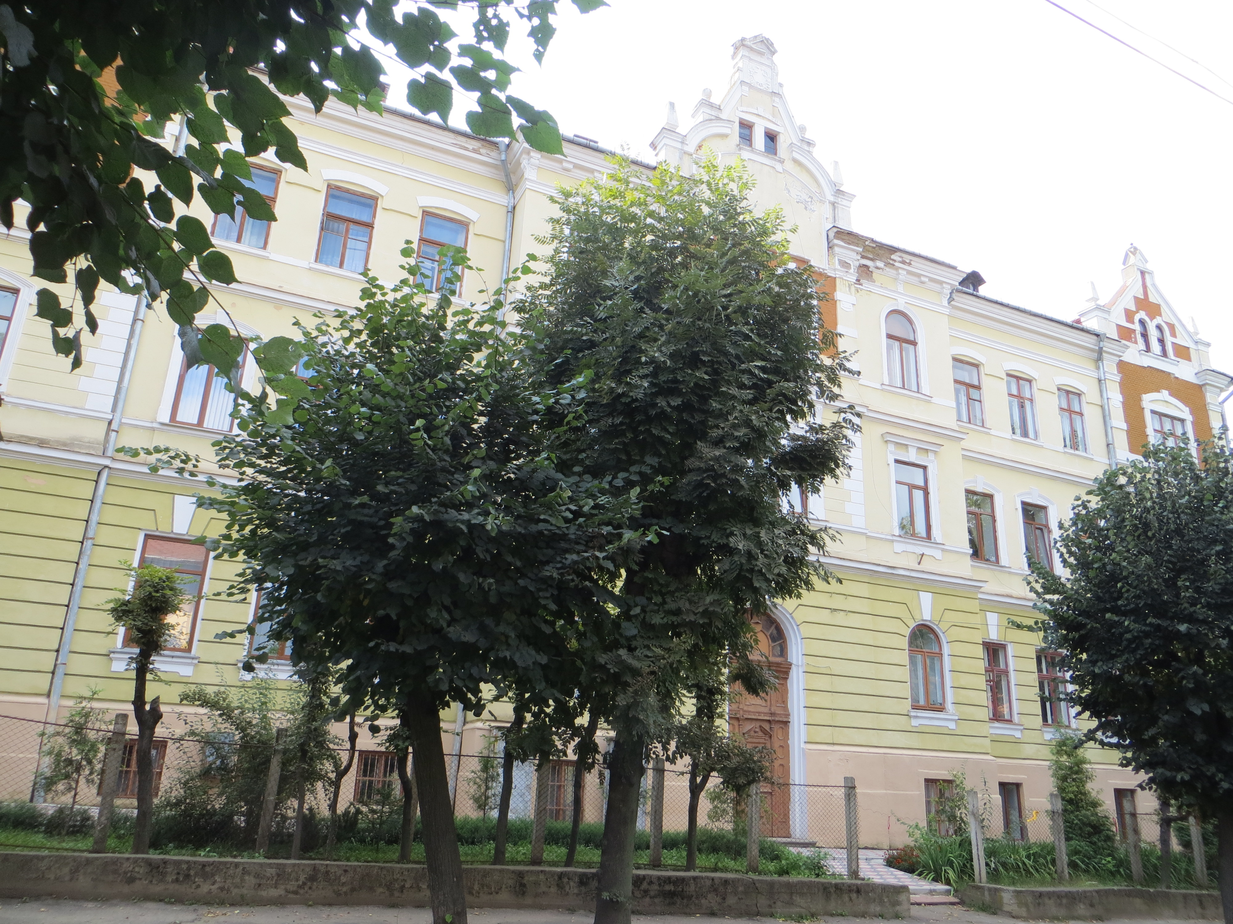 Залізничне управління, Чернівці, вул. В. Аксенина, 6